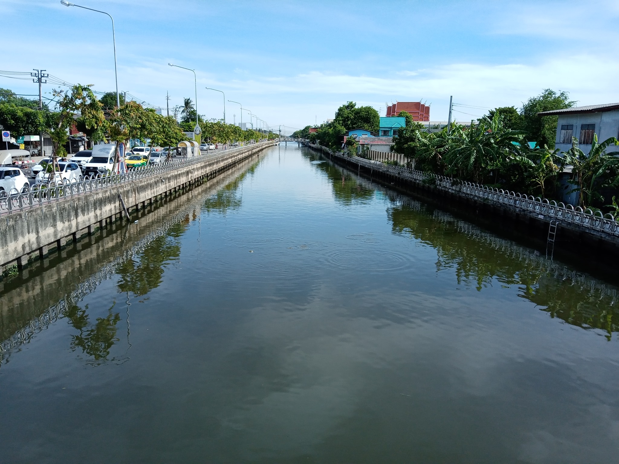 คลองทวีวัฒนาช่วงหน้าสนามหลวง 2